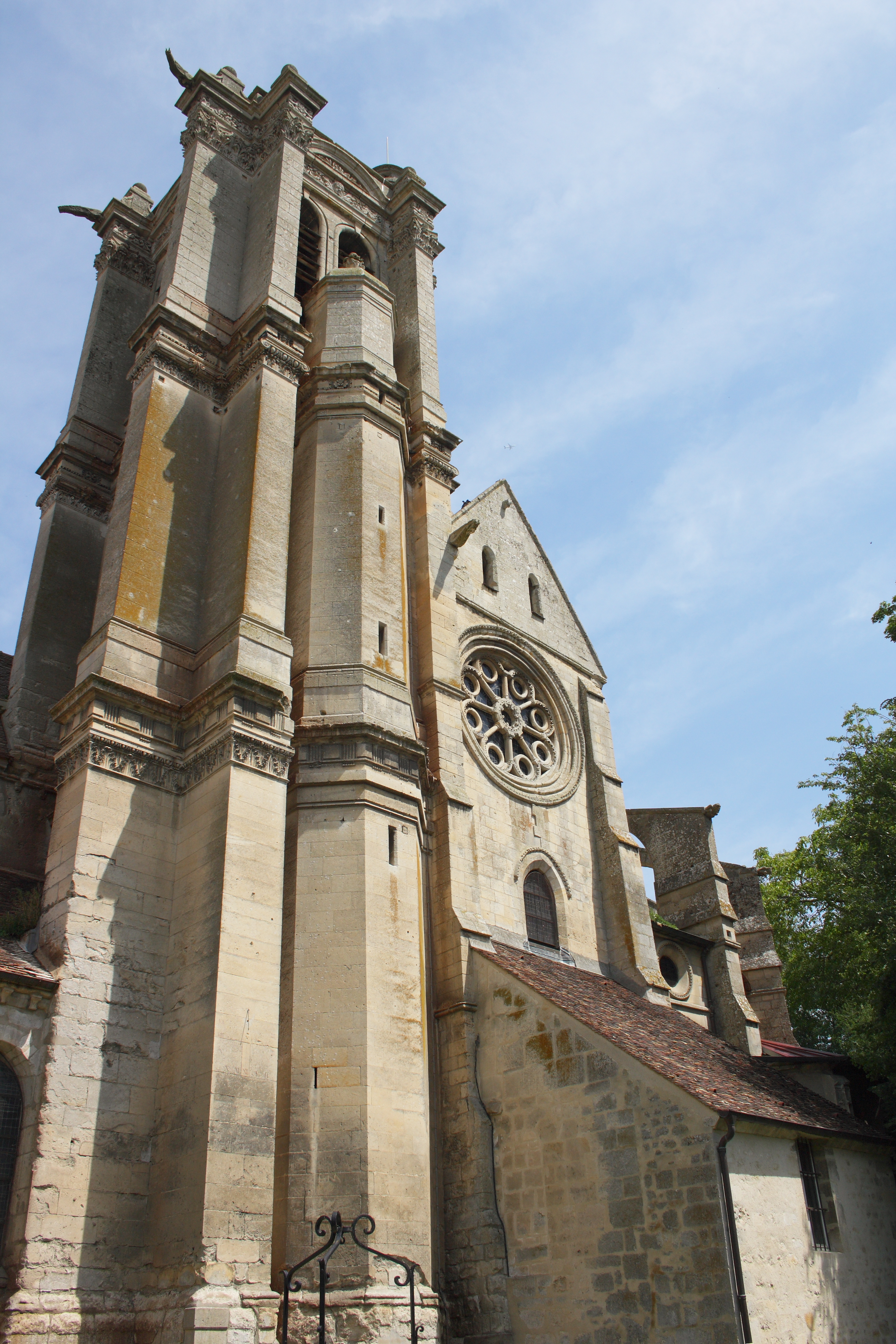 katholische Pfarrkirche Saint-Sulpice in Chars